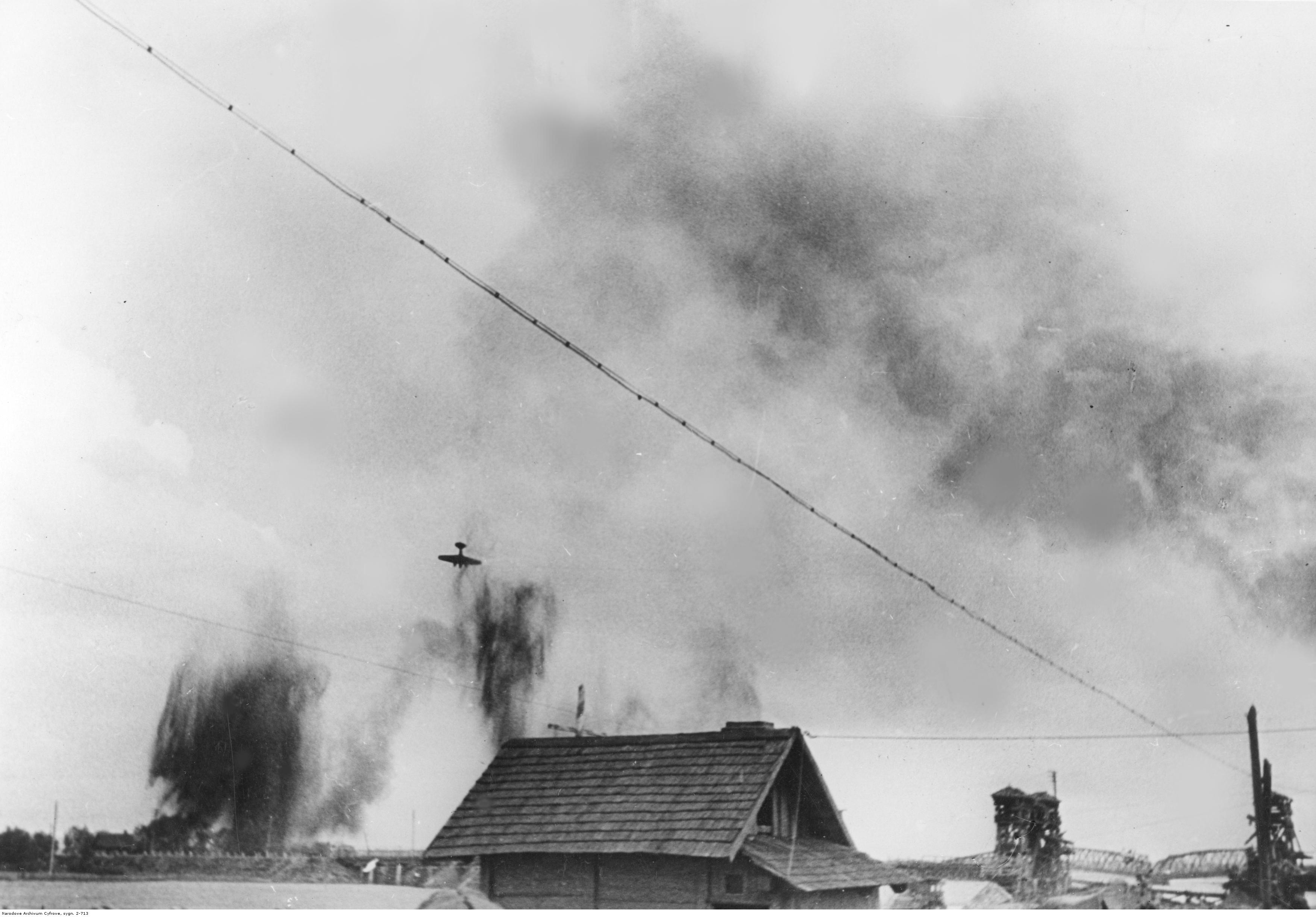 Zestrzelony podczas walk nad Berezyną radziecki bombowiec Tupolew SB-2 MIO3 spada w dół.